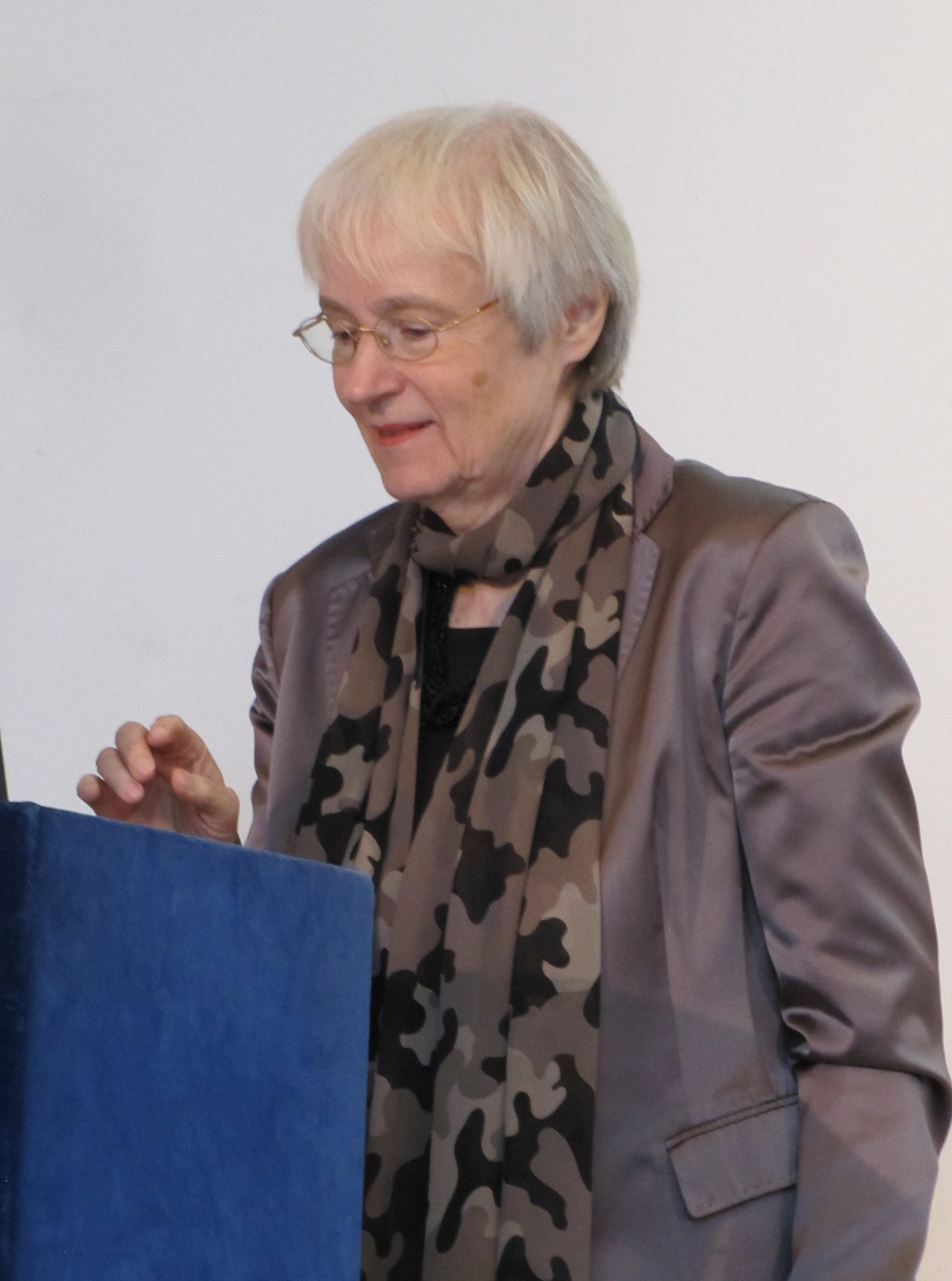 Cristine Landfried, bei den 47. Römerberggesprächen, Thema:Last Exit nach dem Brexit Ist Europa noch zu retten?", im Mai 2019 im Chagall-Saal der Städtischen Bühnen in Frankfurt am Main.